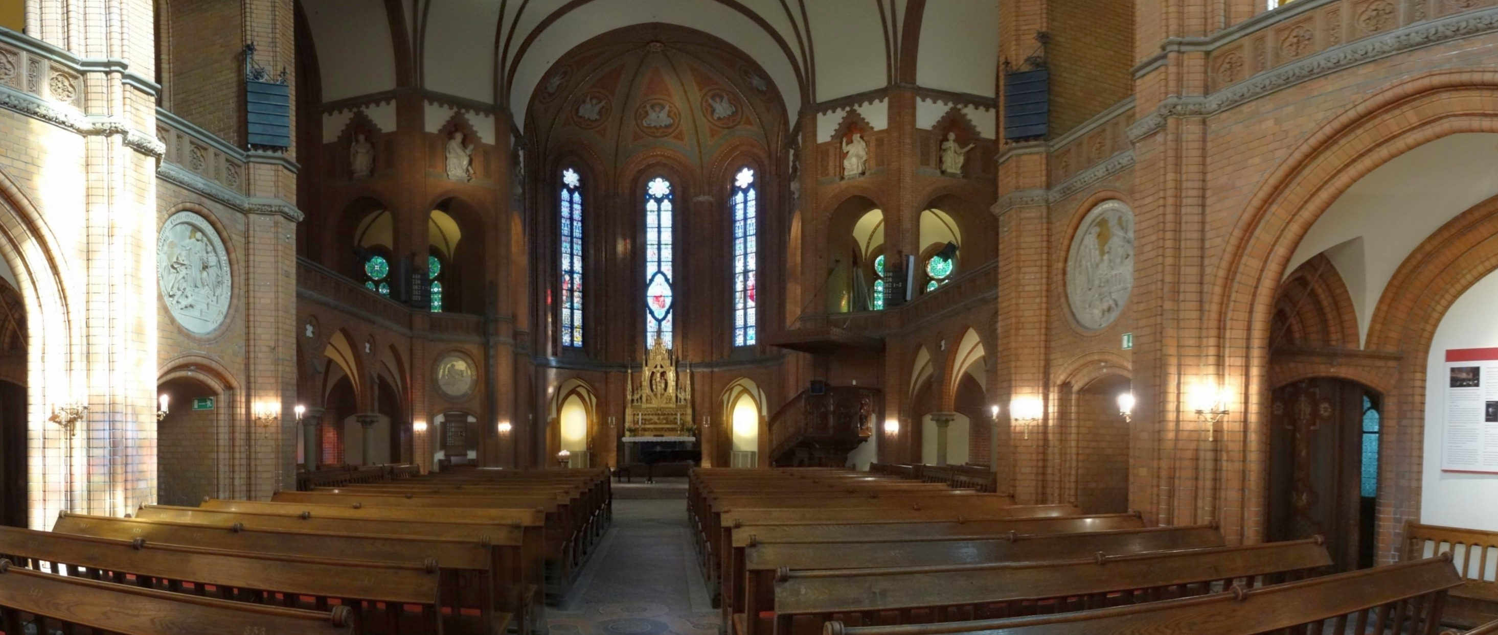 Der Blick zum Altar von St. Johannis in Hamburg-Harvestehude Der Altar ist ein Werk des Bildhauers Fritz Neuber